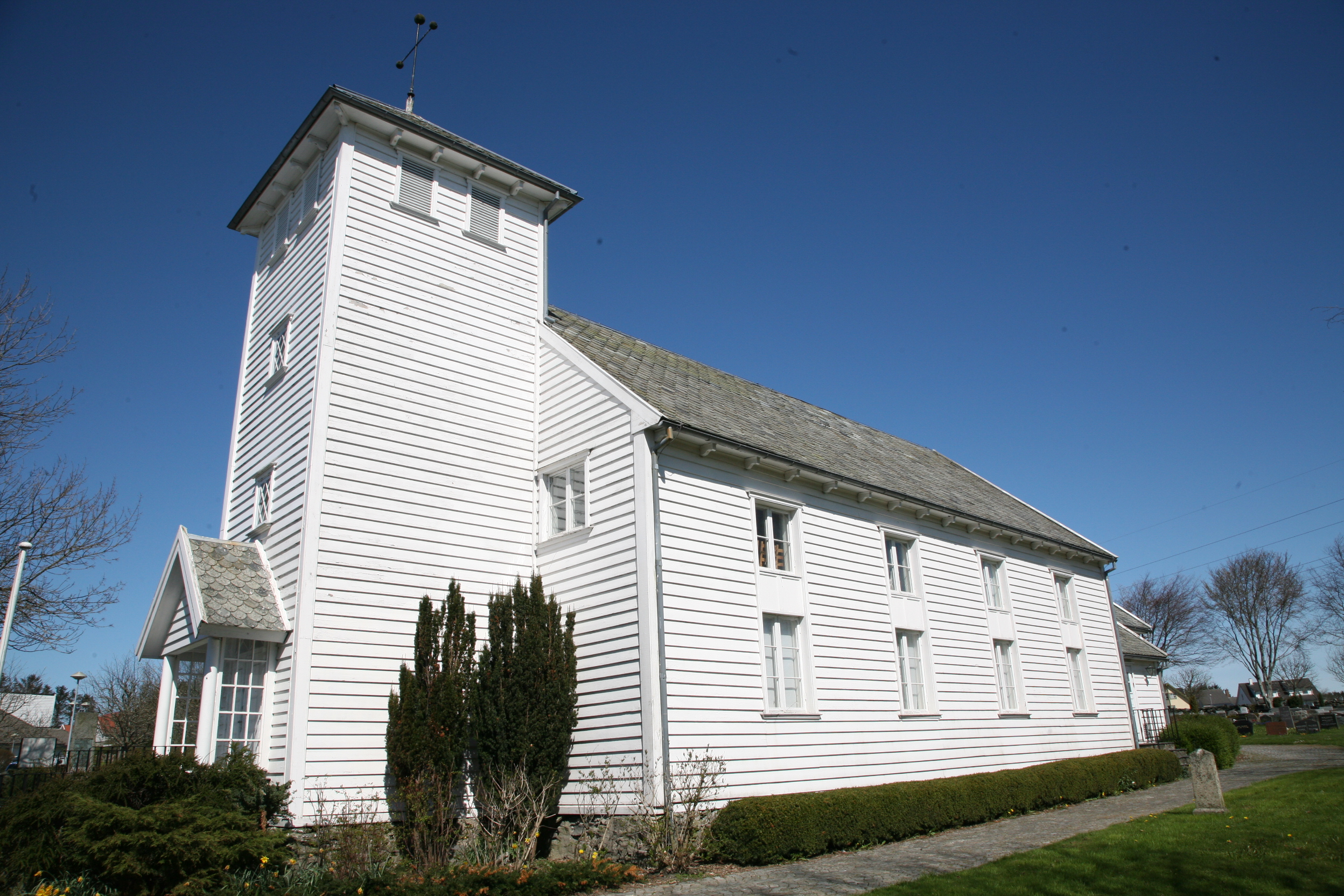 Revheim kirke